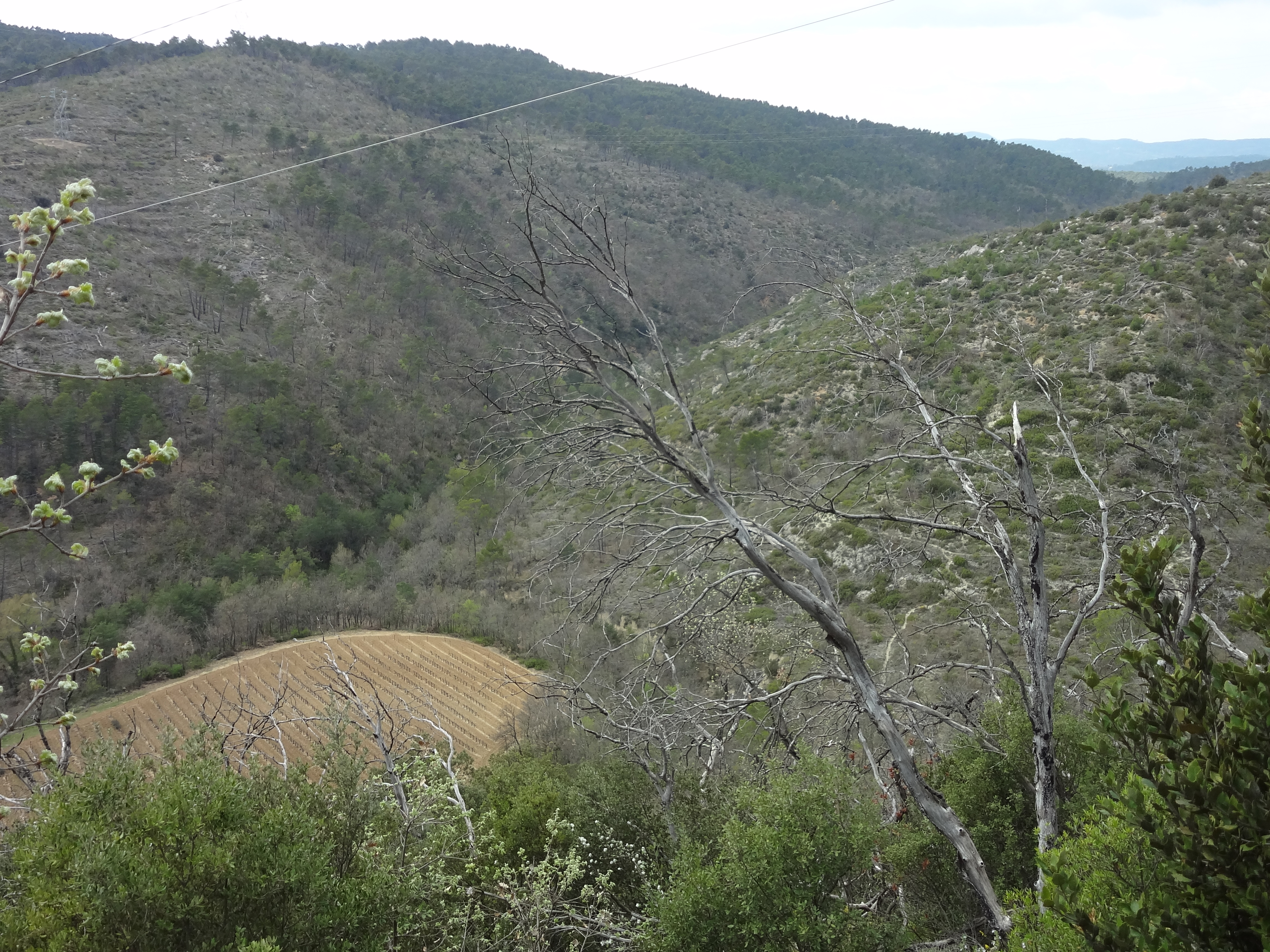 Vestiges de l’incendie de 2002 : collines dénudées, arbre noirci par l’incendie